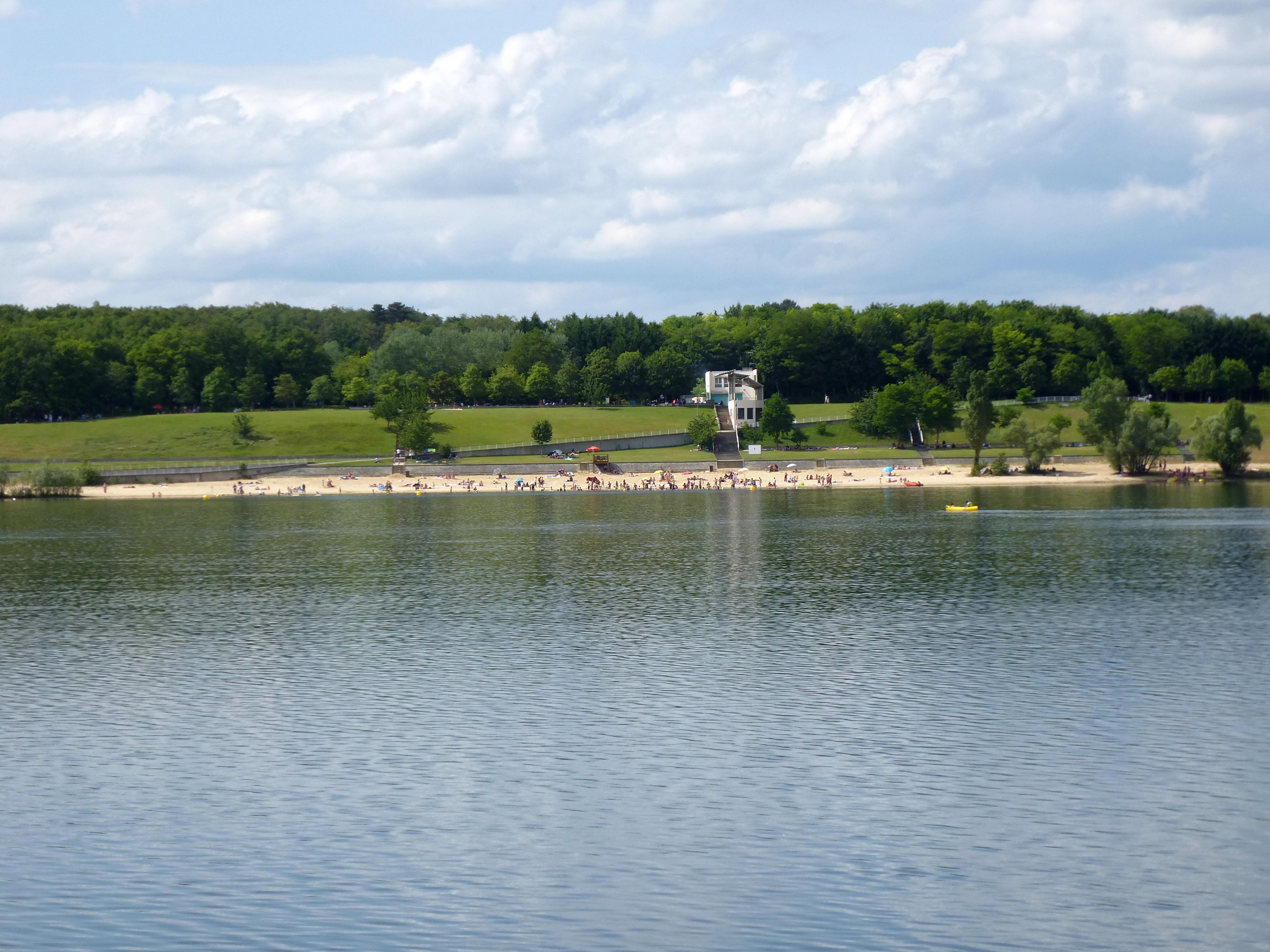 Base de plein air et de loisirs des Boucles de Seine; (département des Yvelines, région Île-de-France).